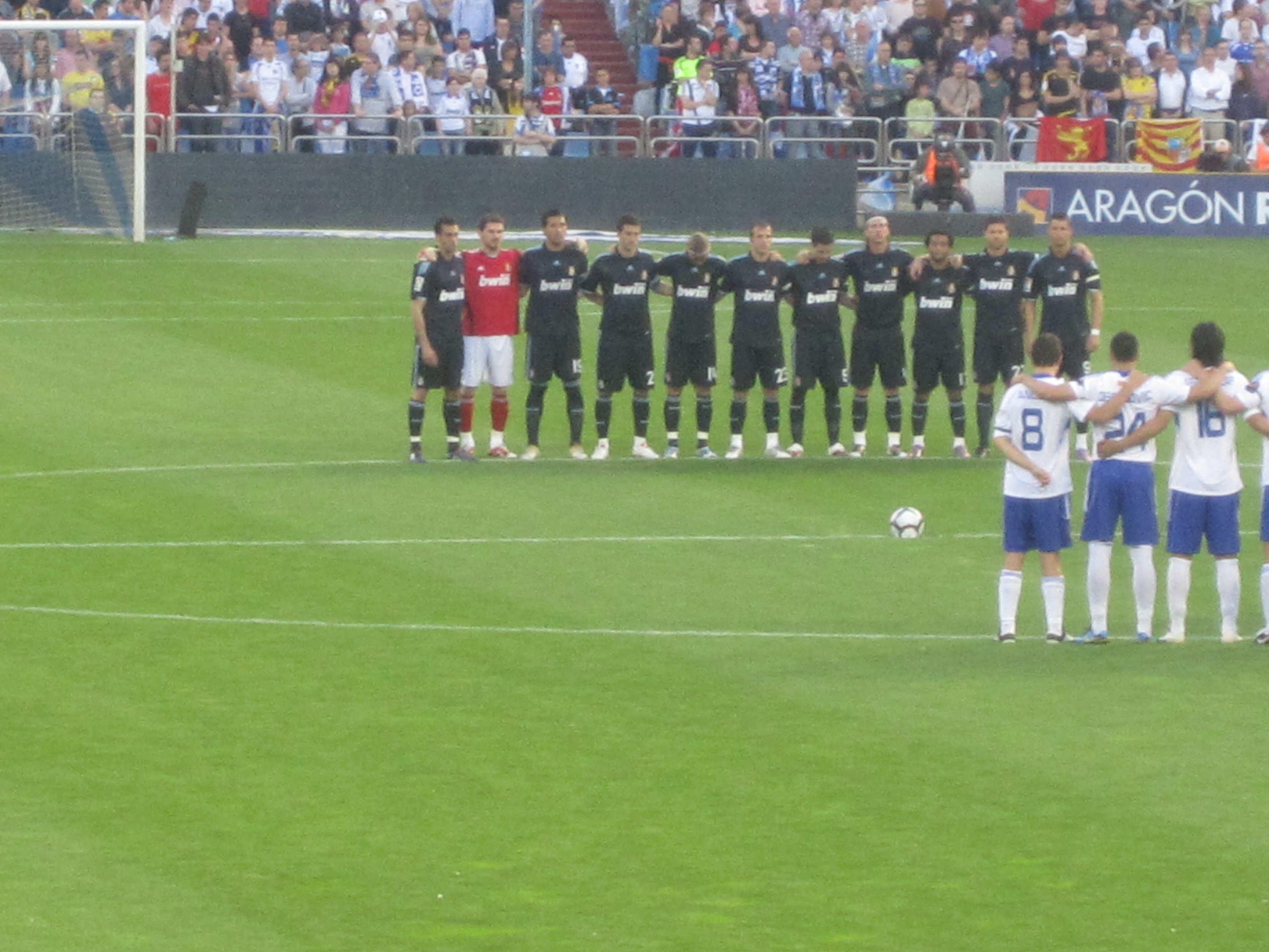 Alineación inicial del Real Madrid en un partido de Liga de 2010.